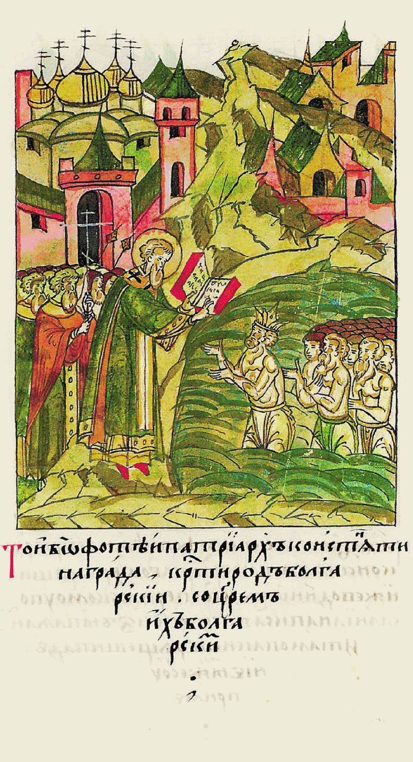 Тот же Фотий, патриарх Кон- стантинополя, крестил народ бол- гарский вместе с их царем Болгарским.